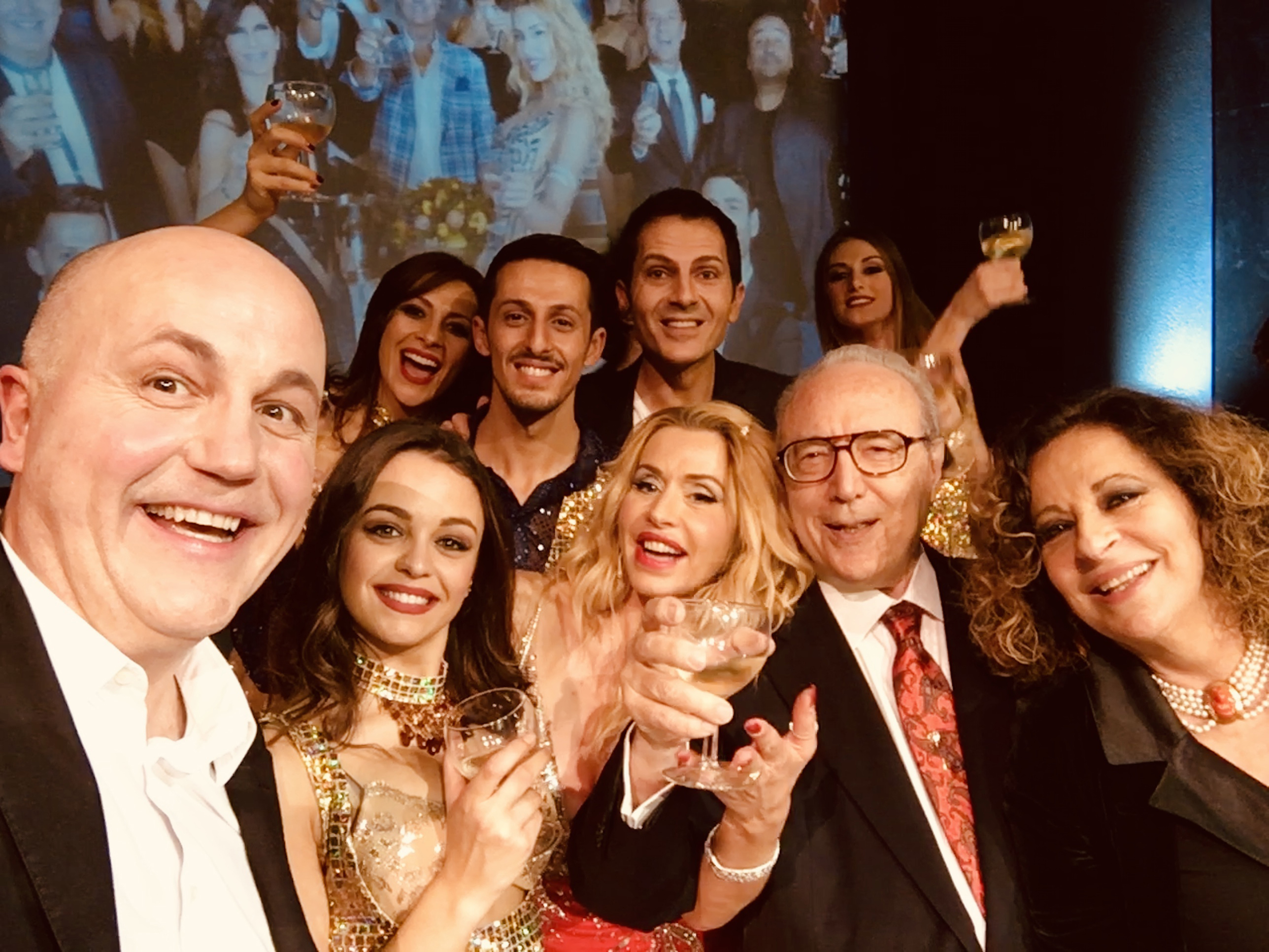 Dopo la fine dello spettacolo, la compagnia del Bagaglino al Teatro Salone Margherita di Roma, festeggia il nuovo anno